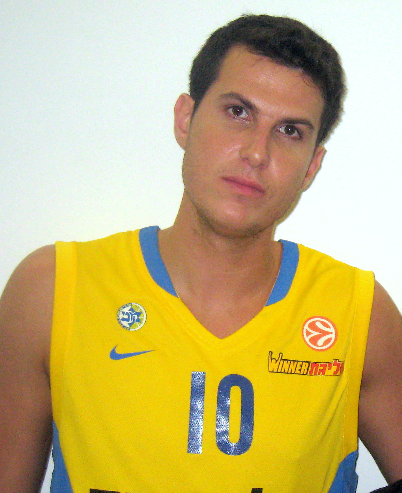 גיא פניני, התמונה צולמה במסגרת משחק כדורסל שהתקיים בהיכל נוקיה ביד אליהו .